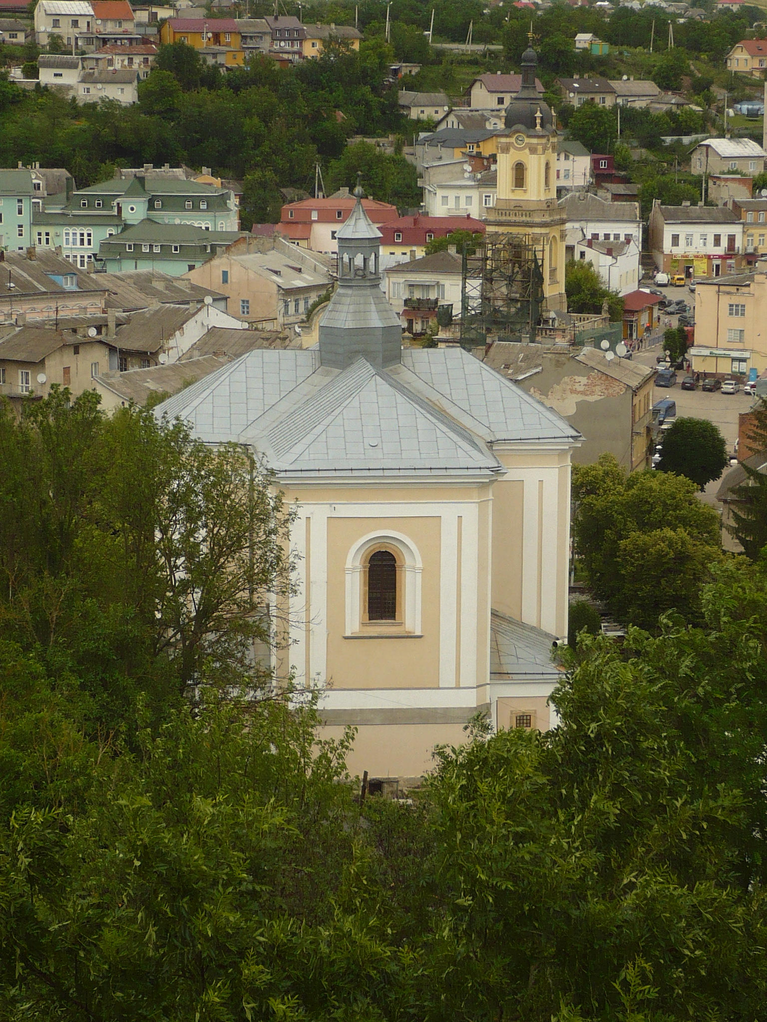 Buczacz. Kościół Wniebowzięcia NMP